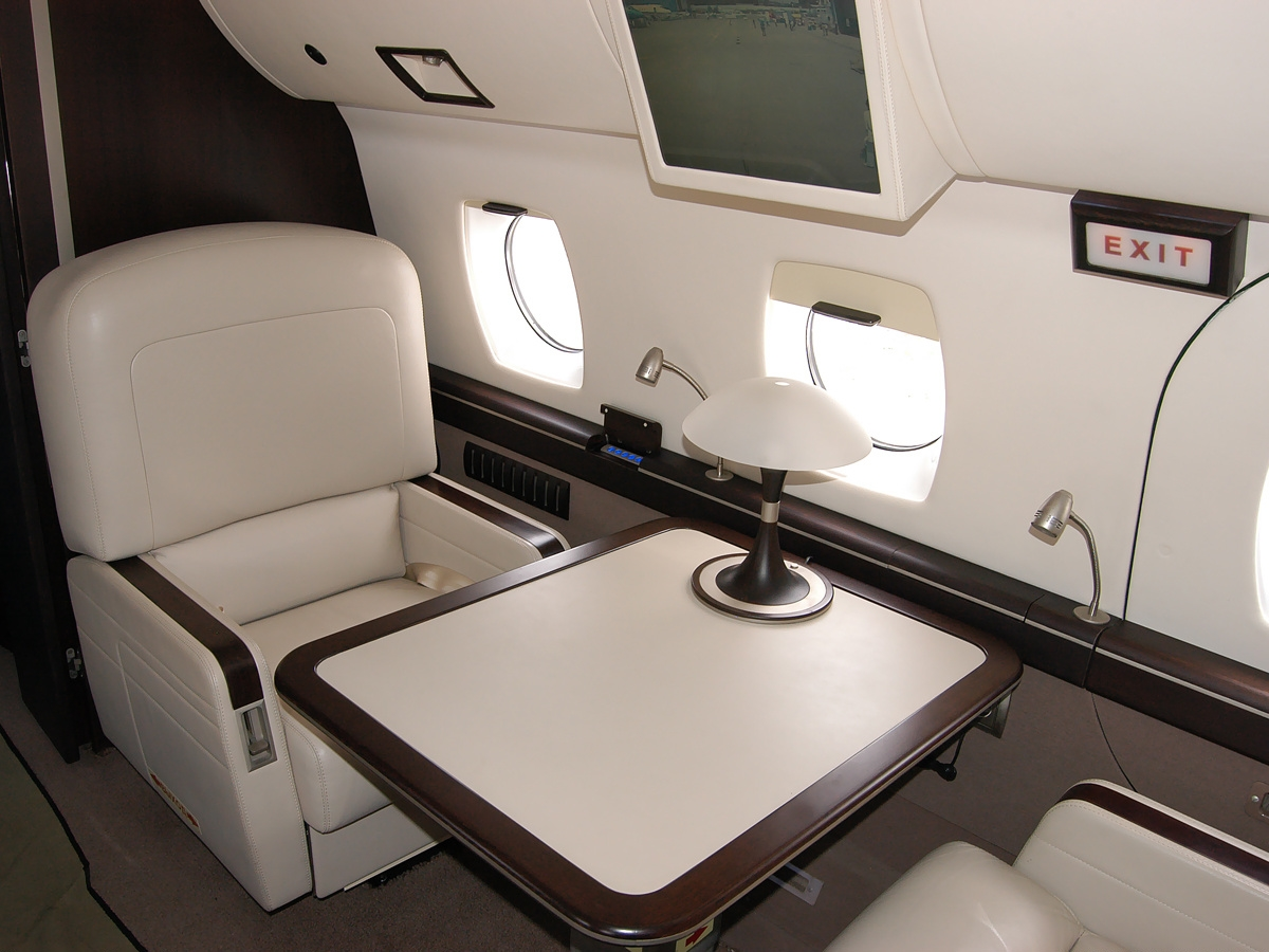 Yakovlev Yak-40 (RA-87226 (cn 9841459) Tulpar Air)